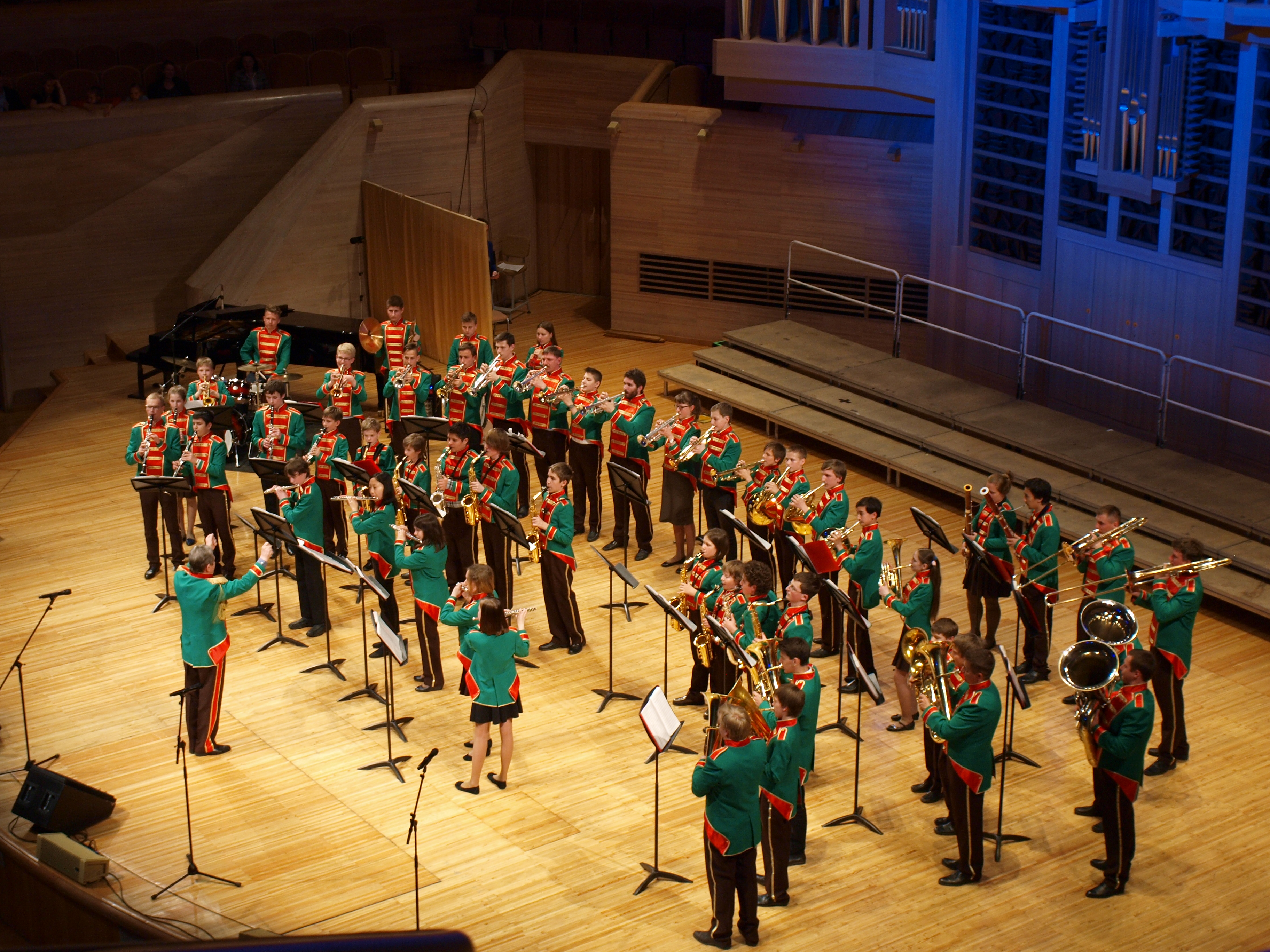 Концертный оркестр ДМШ имени Табакова. Дирижирует А.М. Паутов. Международный дом музыки